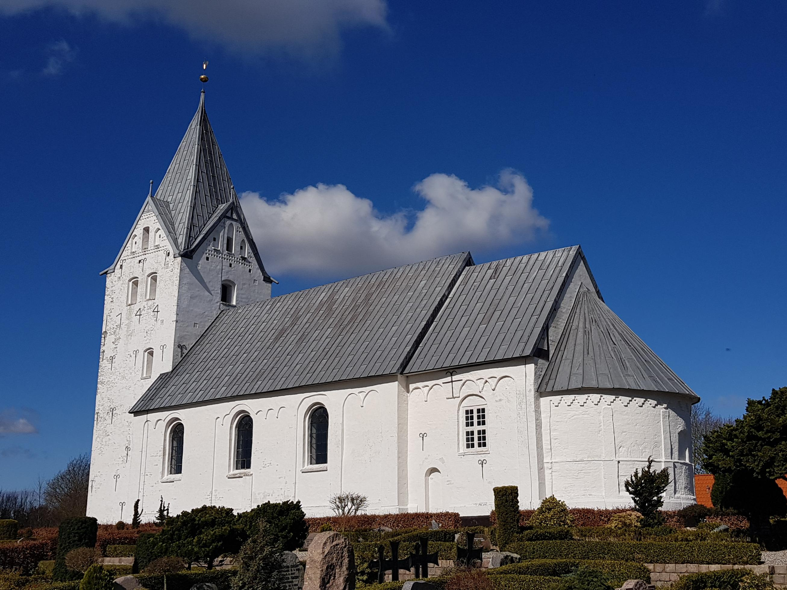 Spandet Kirke